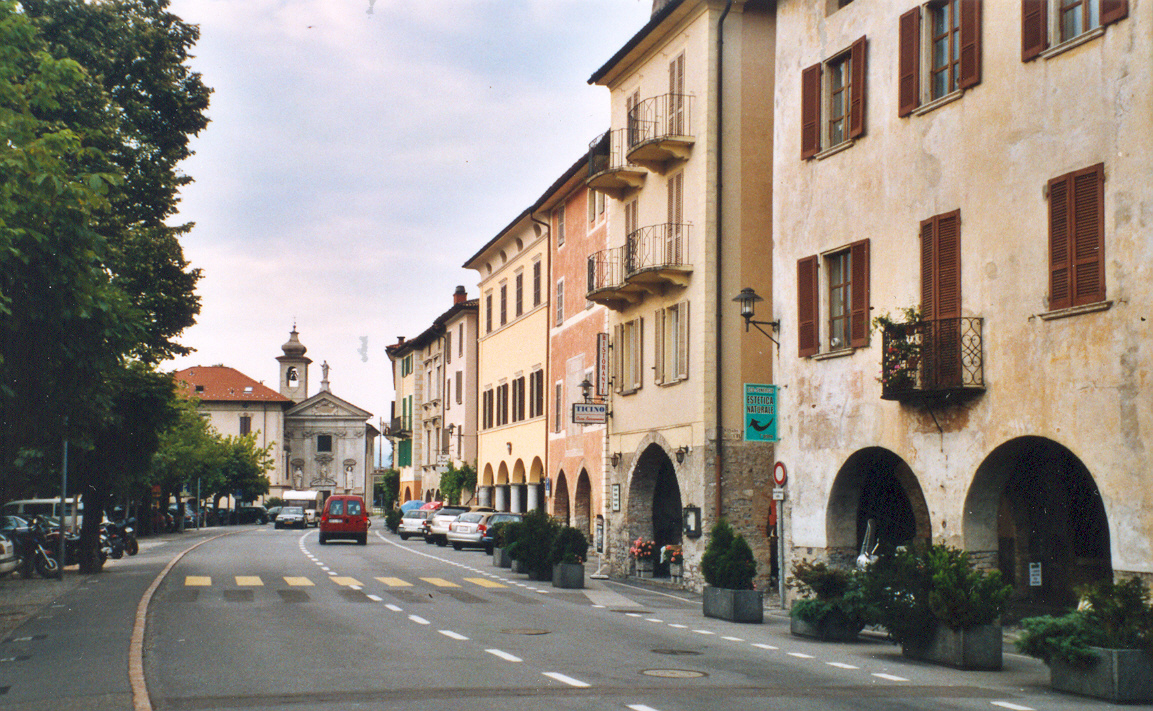 Bissone, Hauptstrasse am See, Kanton Tessin, Schweiz.